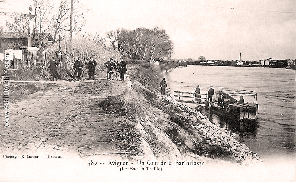 Bac à traille assurant la navette sur le Rhône entre Avignon et l'île de la Barthelasse